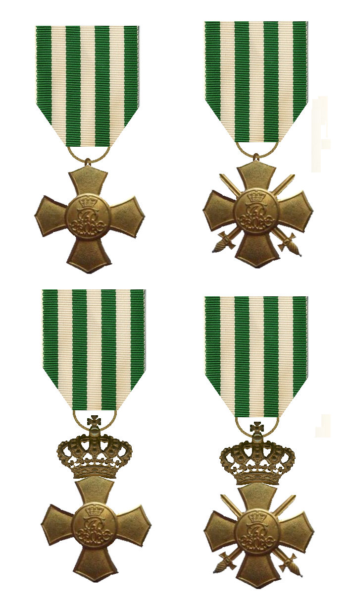 Allegemeines Ehrenkreuz Sachsen